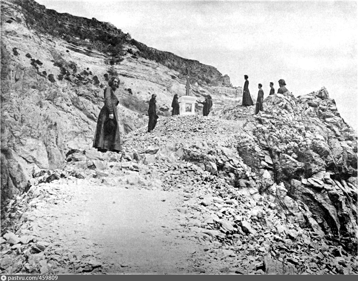 Памятник тысячелетия на Георгиевской скале Памятникъ тысячелѣтия на Георгiевской скалѣ, сооружен в 1891 г. въ память явленiя Св. Георгiя въ 891 г. Monument erigé en 1891 en memoire de l'apparition de St. Georges sur le rocher en 891.